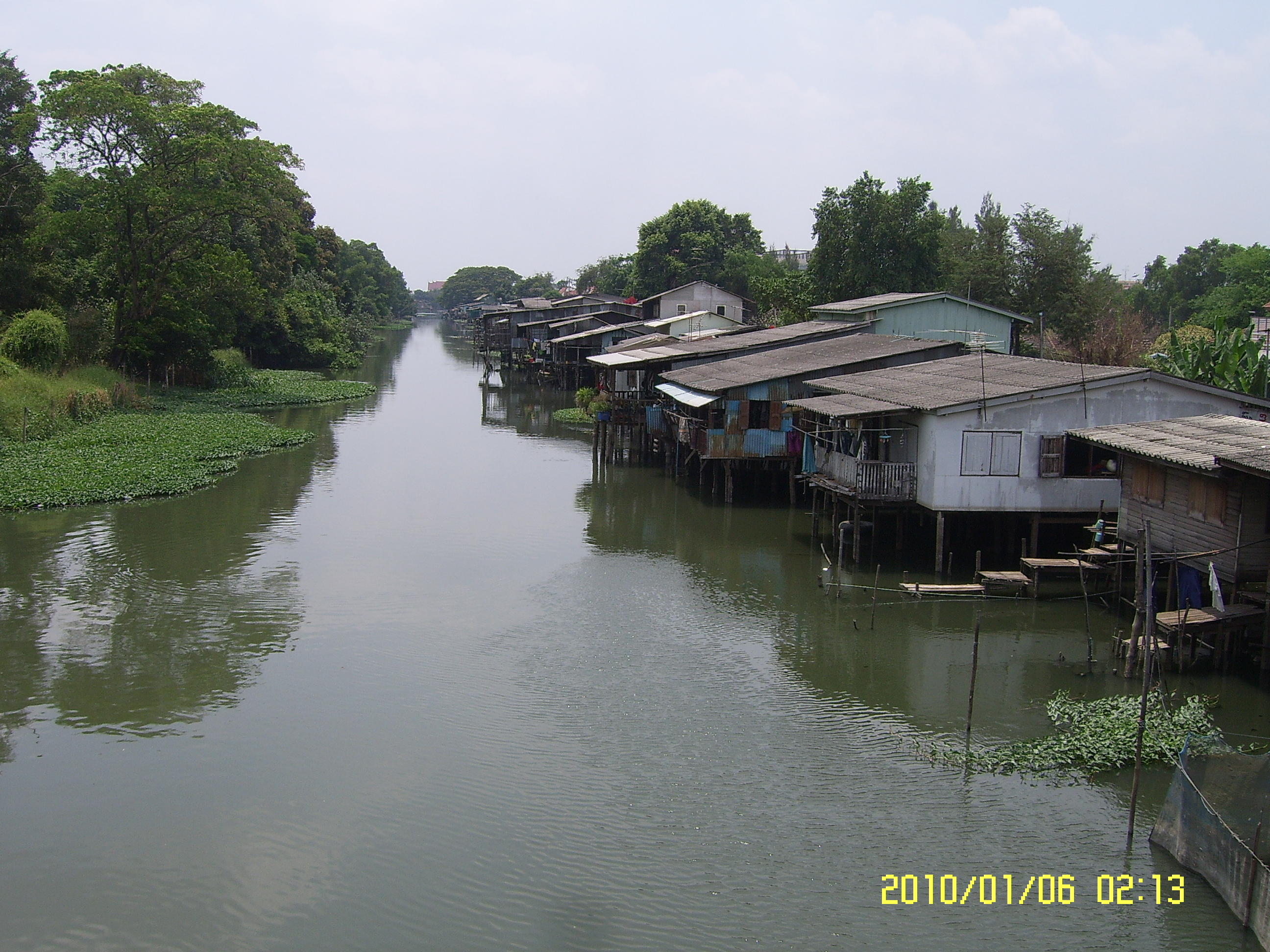 ชุมชนบ้านริมคลองสายใหม ตอนใต้